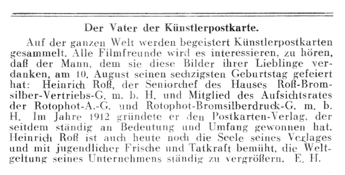 Artikel aus der Zeitschrift Die Filmwoche 1930 Nr. 33 zu Heinrich Ross